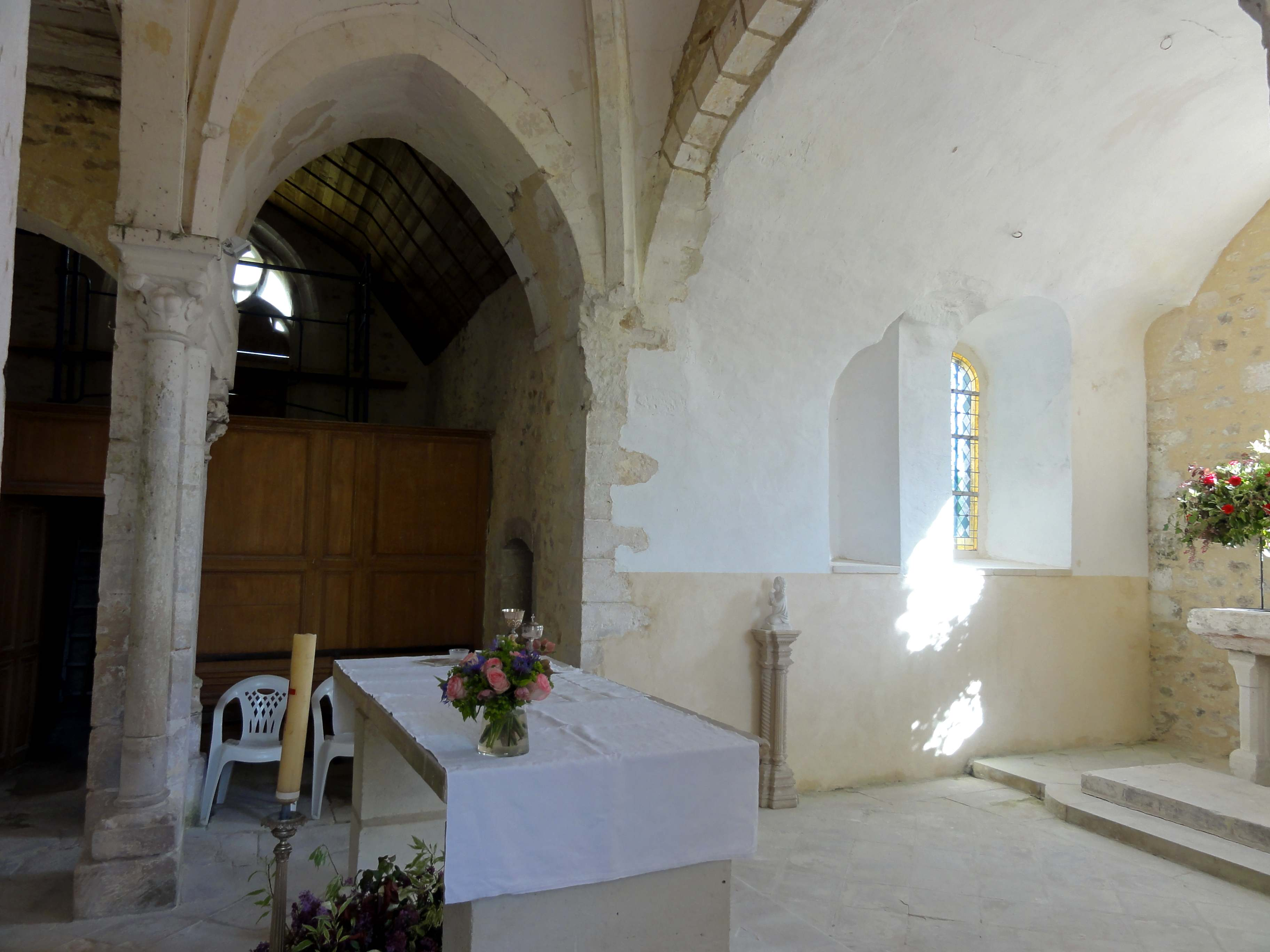 Intérieur de l'église - voir tire.